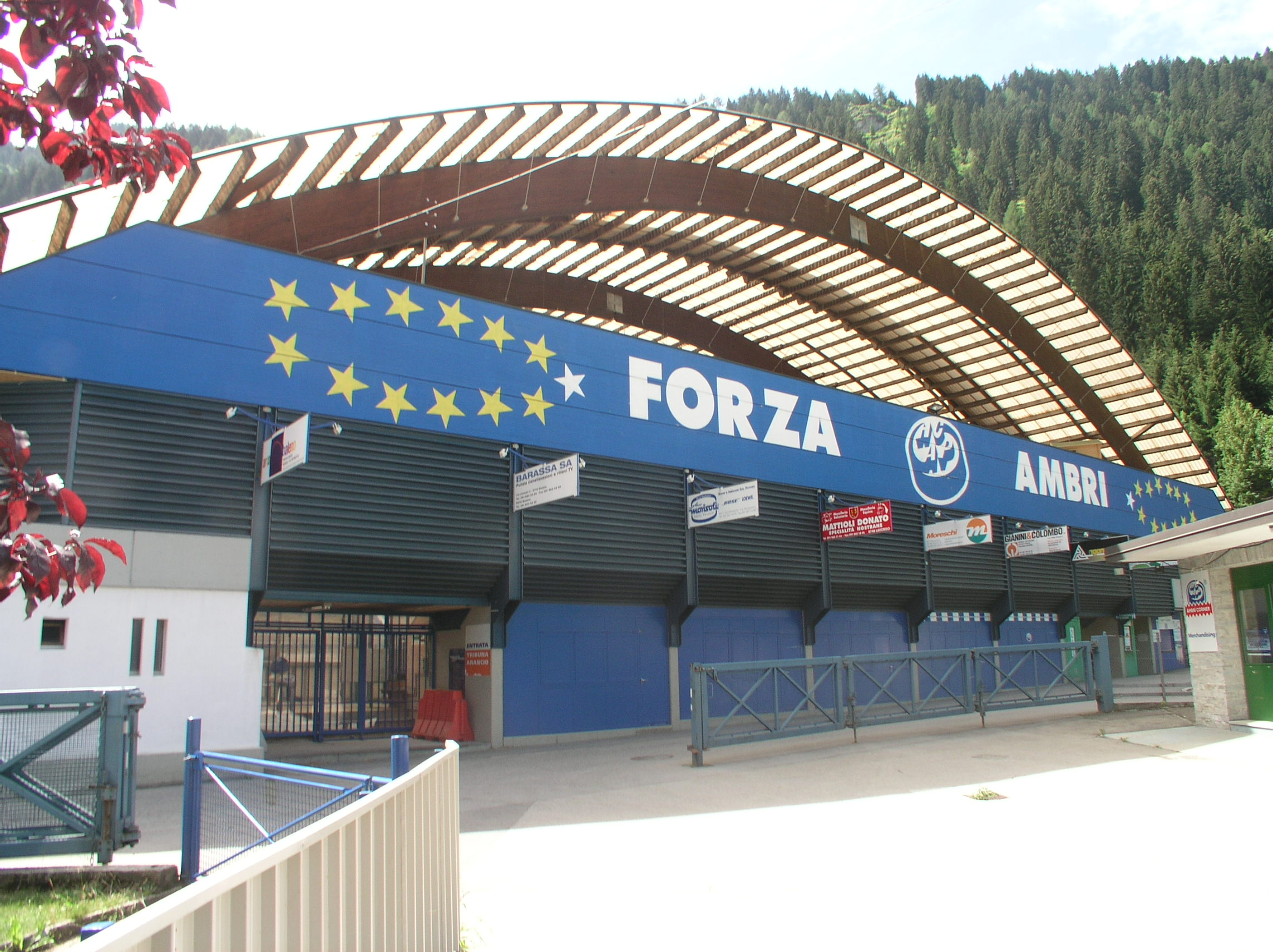 Pista la Valascia von aussen